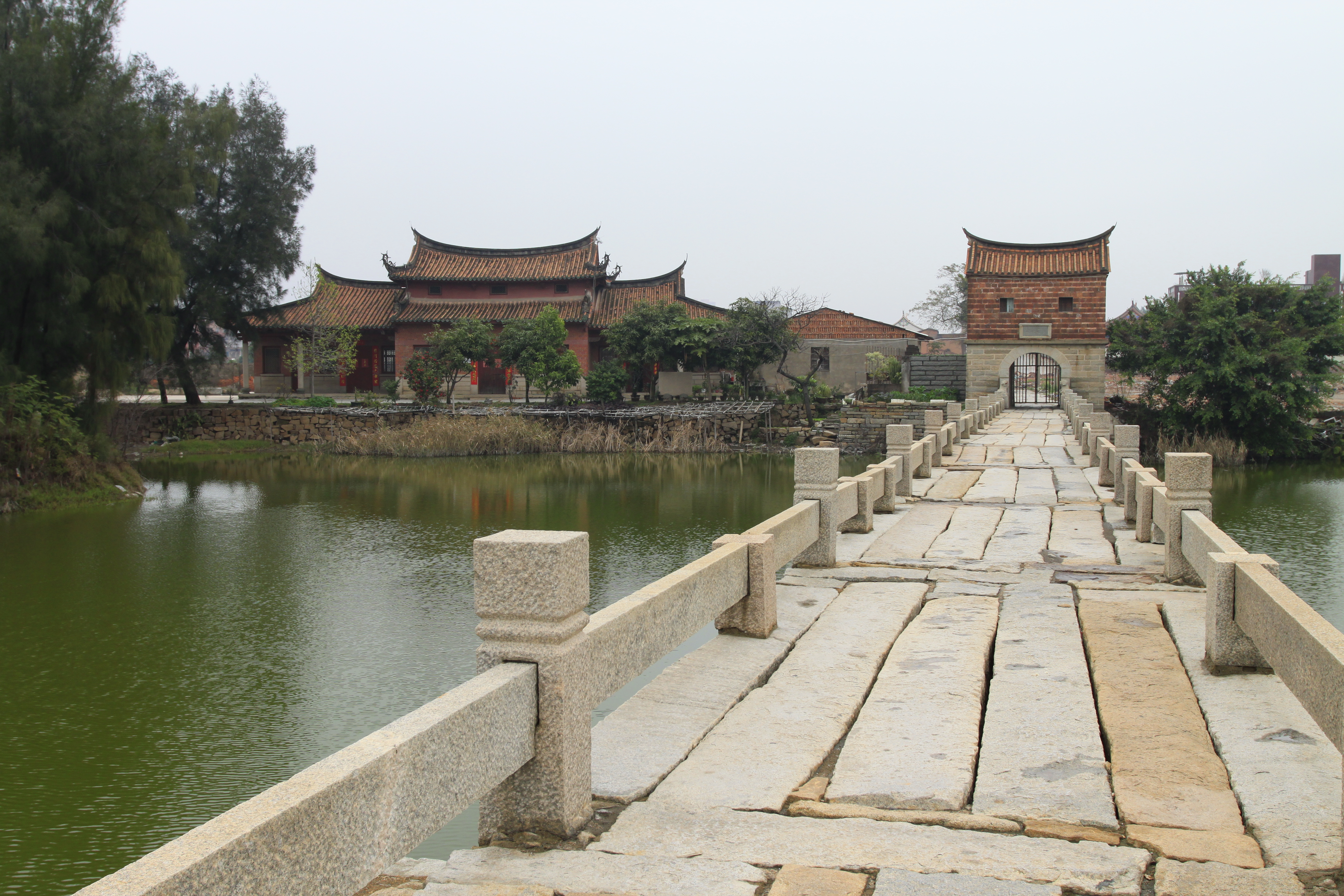 安平桥 东段